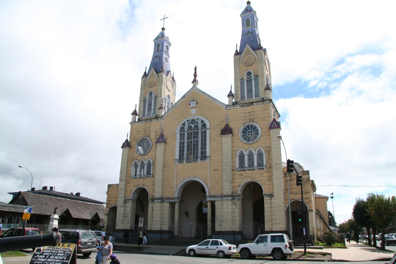 Iglesia San Francisco de Castro, isla de Chiloé, ChileWooden Church